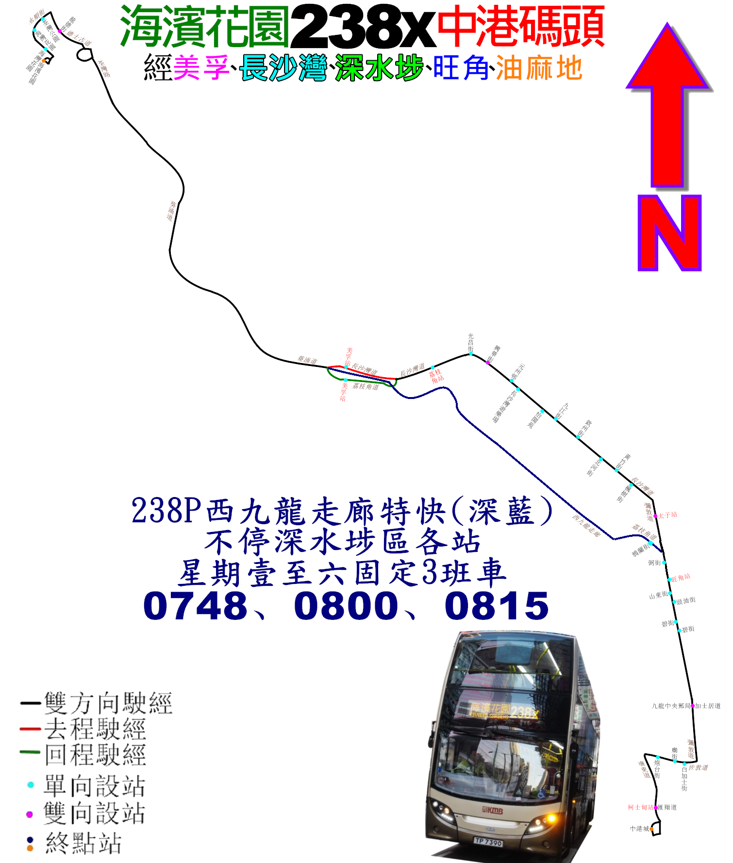 中文（香港）: 九巴238X線的走線圖